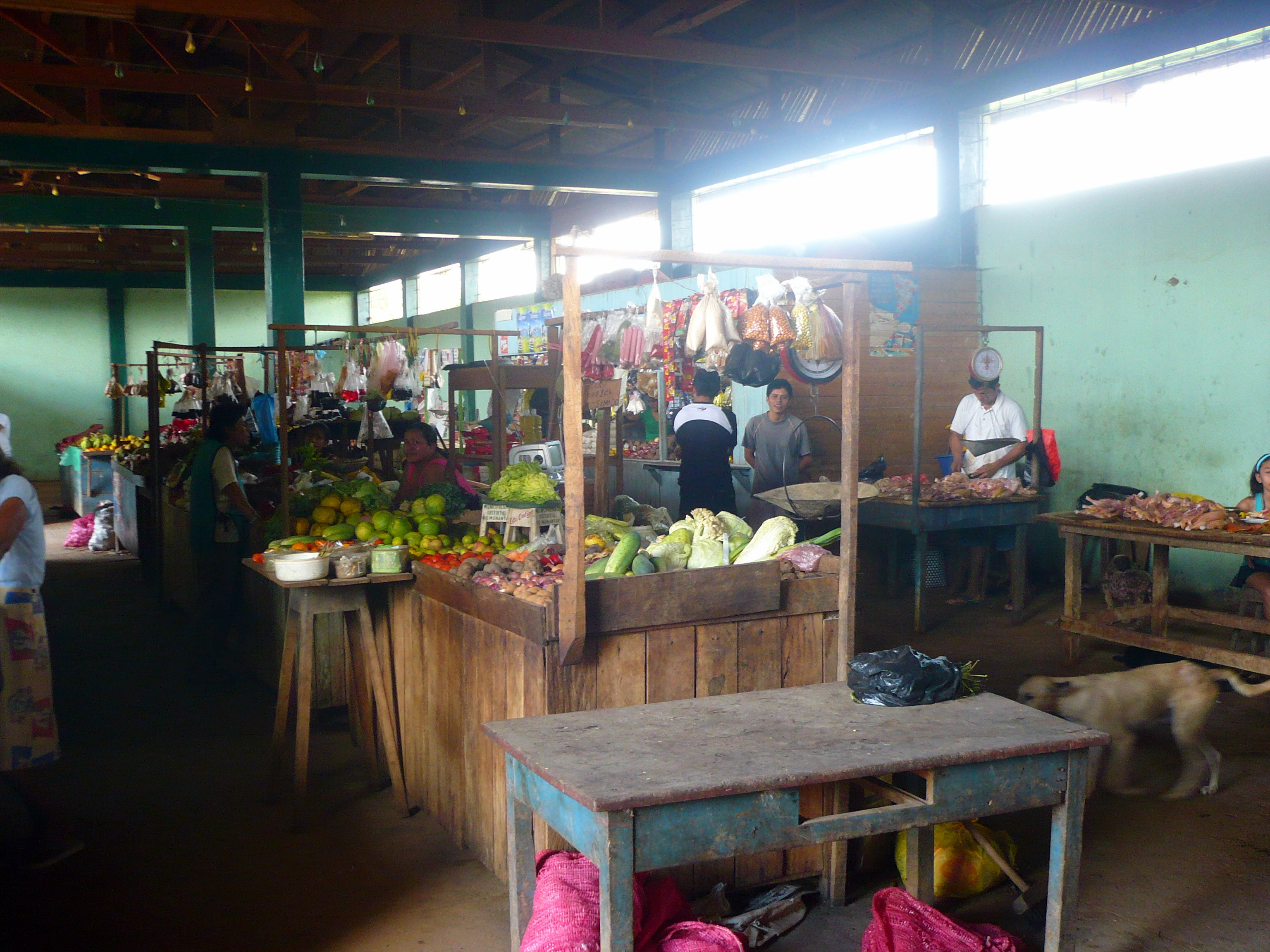 El mercado municipal de Manantay (Pucallpa), observando su interior comercial desde el lateral.